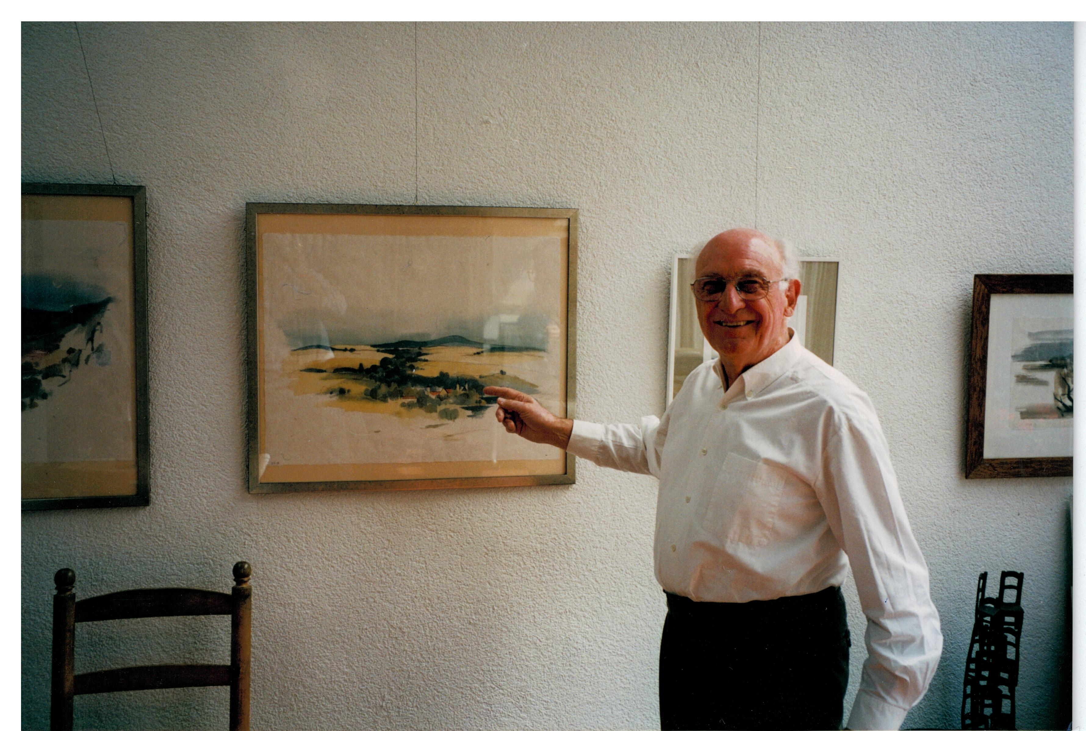 Gunter Ullrich (geb. 1925) ist ein deutscher Grafiker, Maler und Kunstpädagoge. Hier ist er in seinem Atelier in Aschaffenburg/Leider im Jahr 1999 zu sehen.